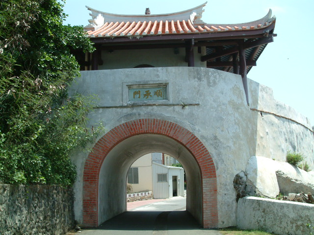 澎湖縣媽宮城順承門（小西門）。